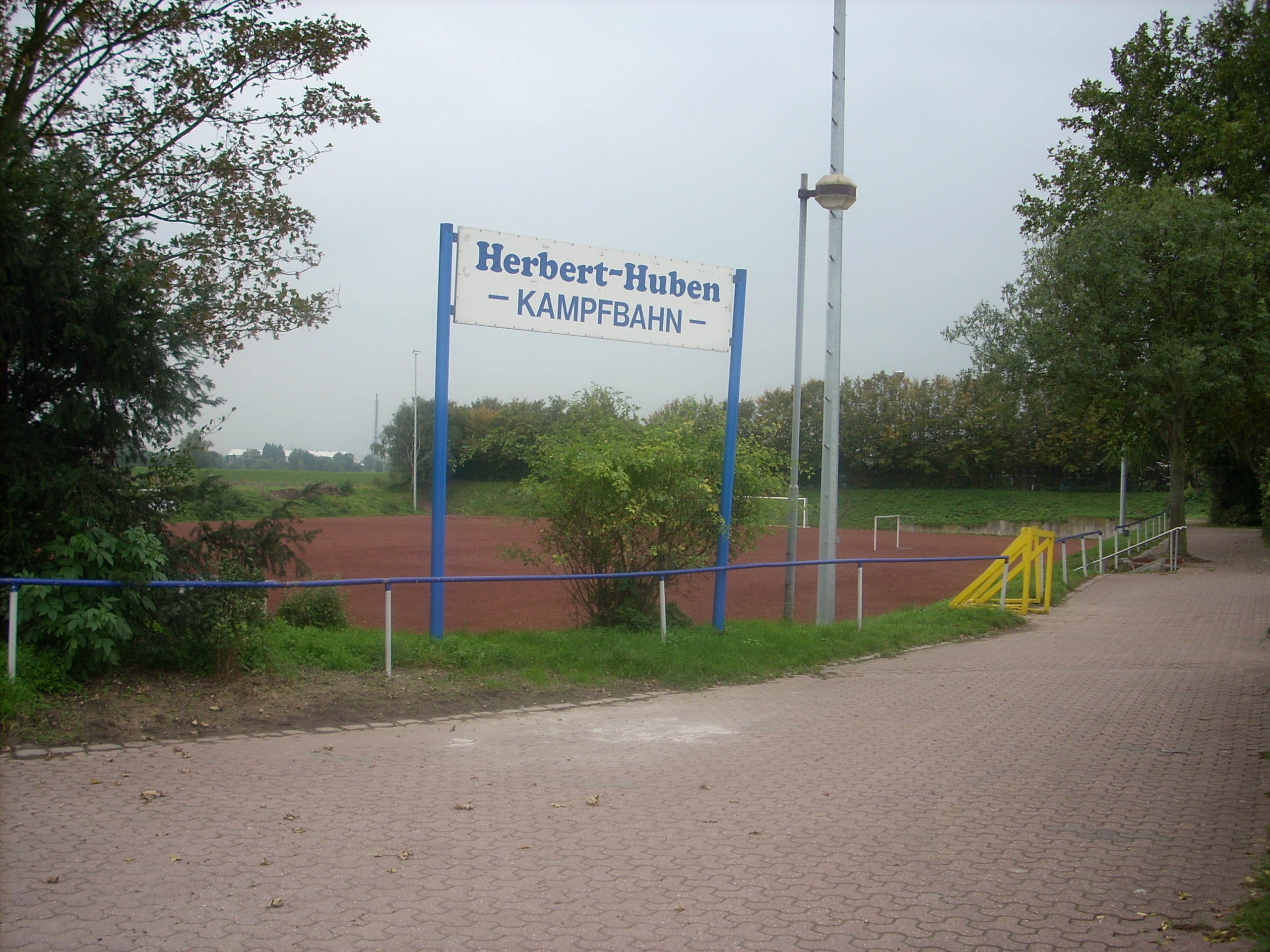 Der Sportplatz der TuS Mündelheim (Duisburg) aus dem Jahr 2007